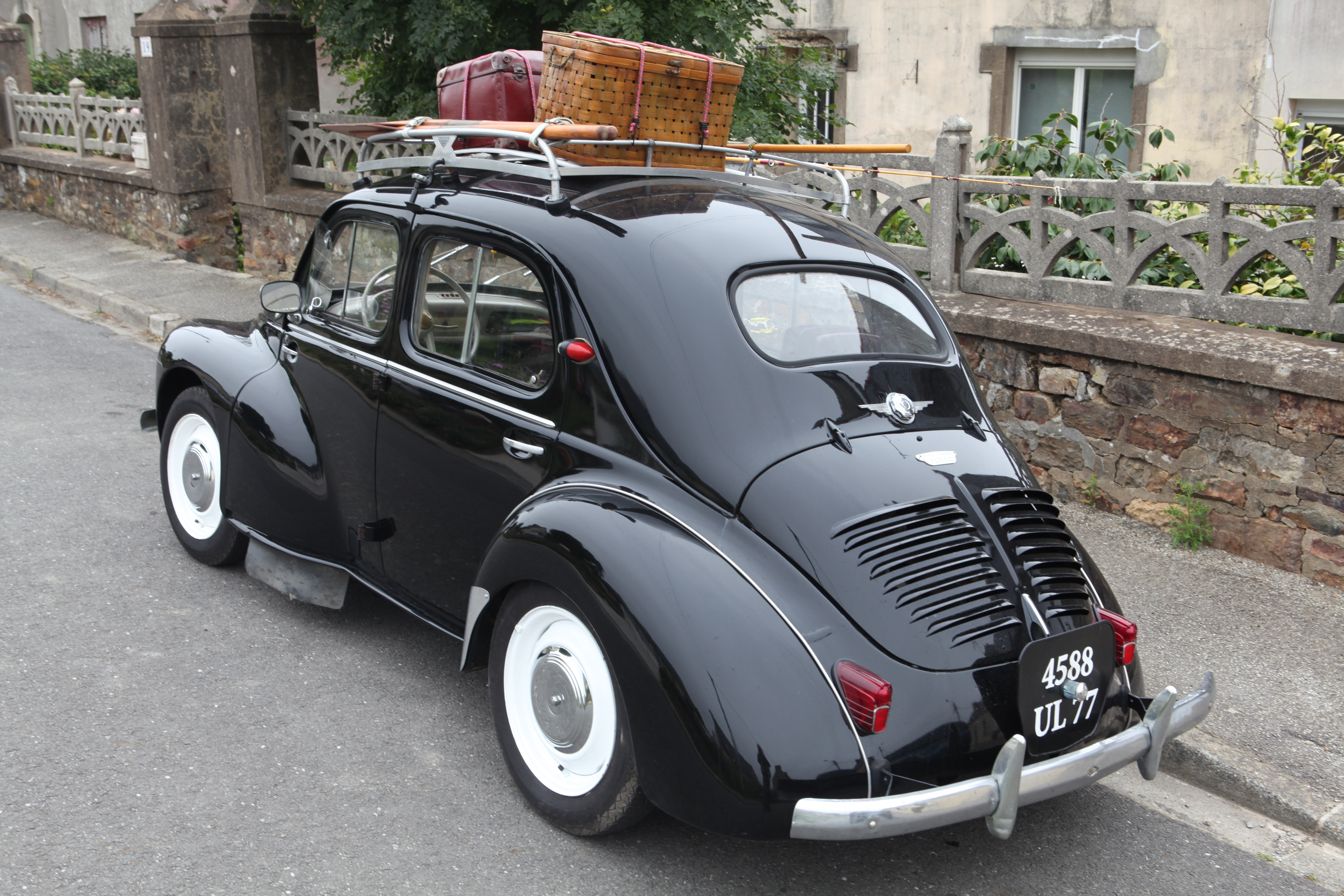 Renault 4 CV